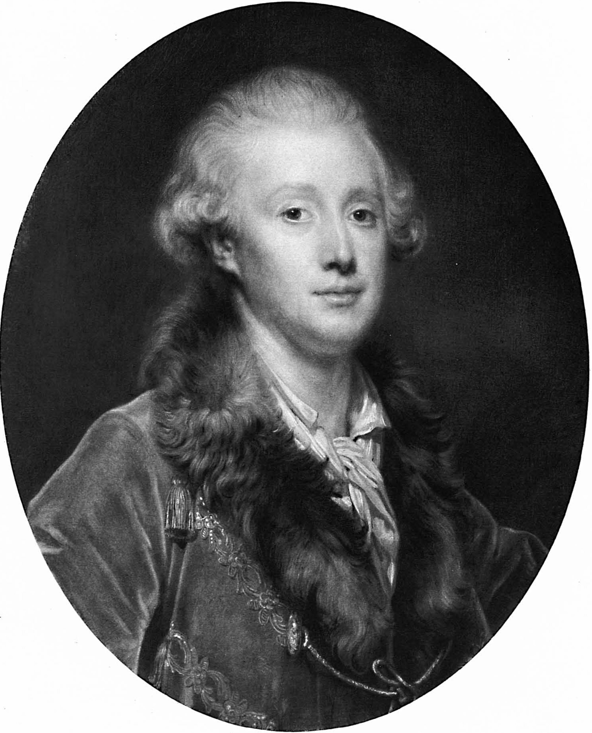 Князь Сергей Сергеевич Гагарин (1745-1798)